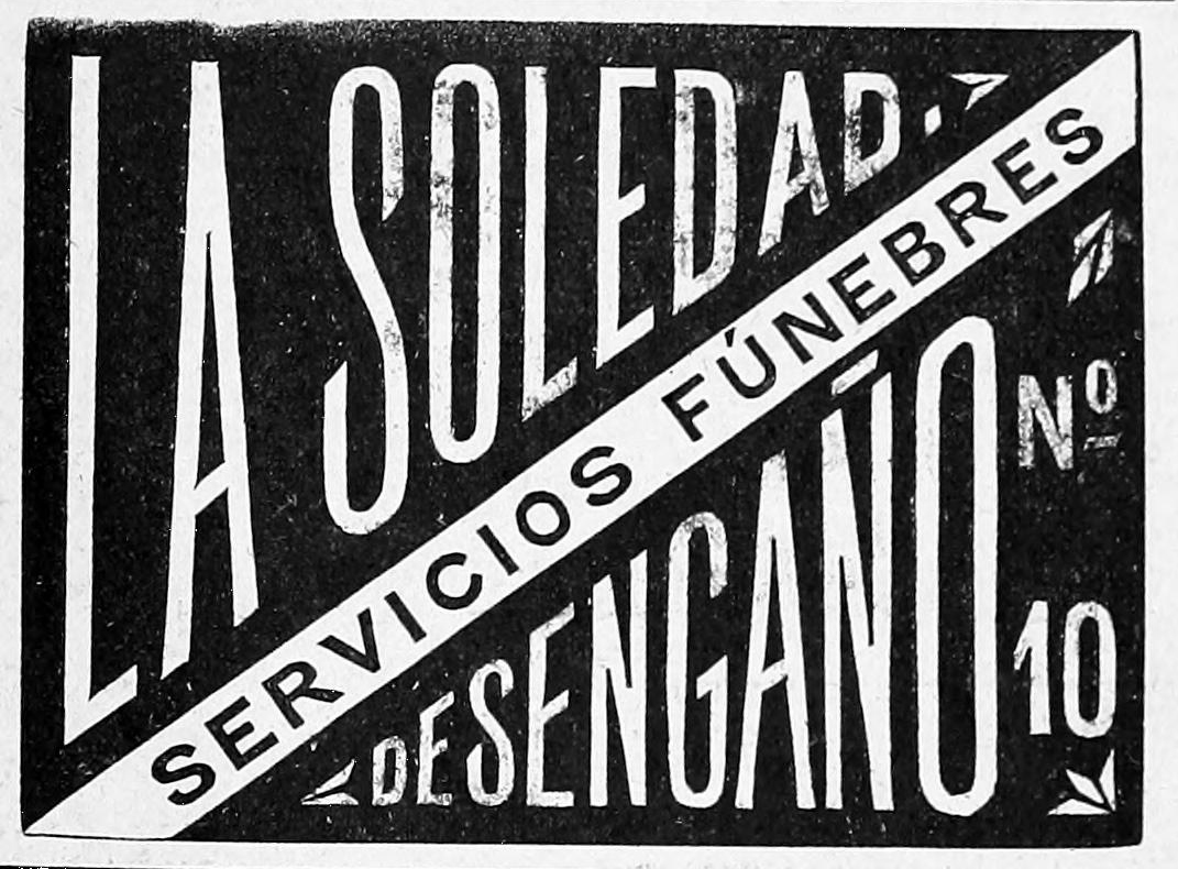 La Soledad, servicios fúnebres. Callen Desengaño nº 10.